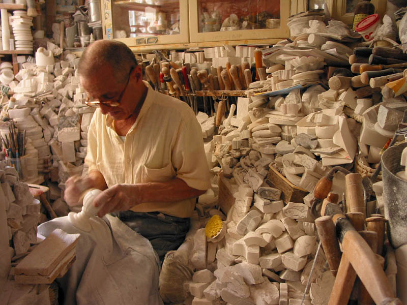 Alabaster Werkstatt in Volterra, Toscana, Italien